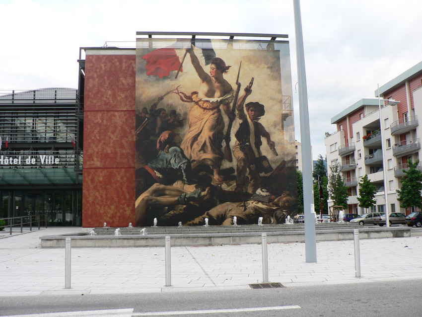 façade de l' Hotel de ville d'échirolles, Isère.